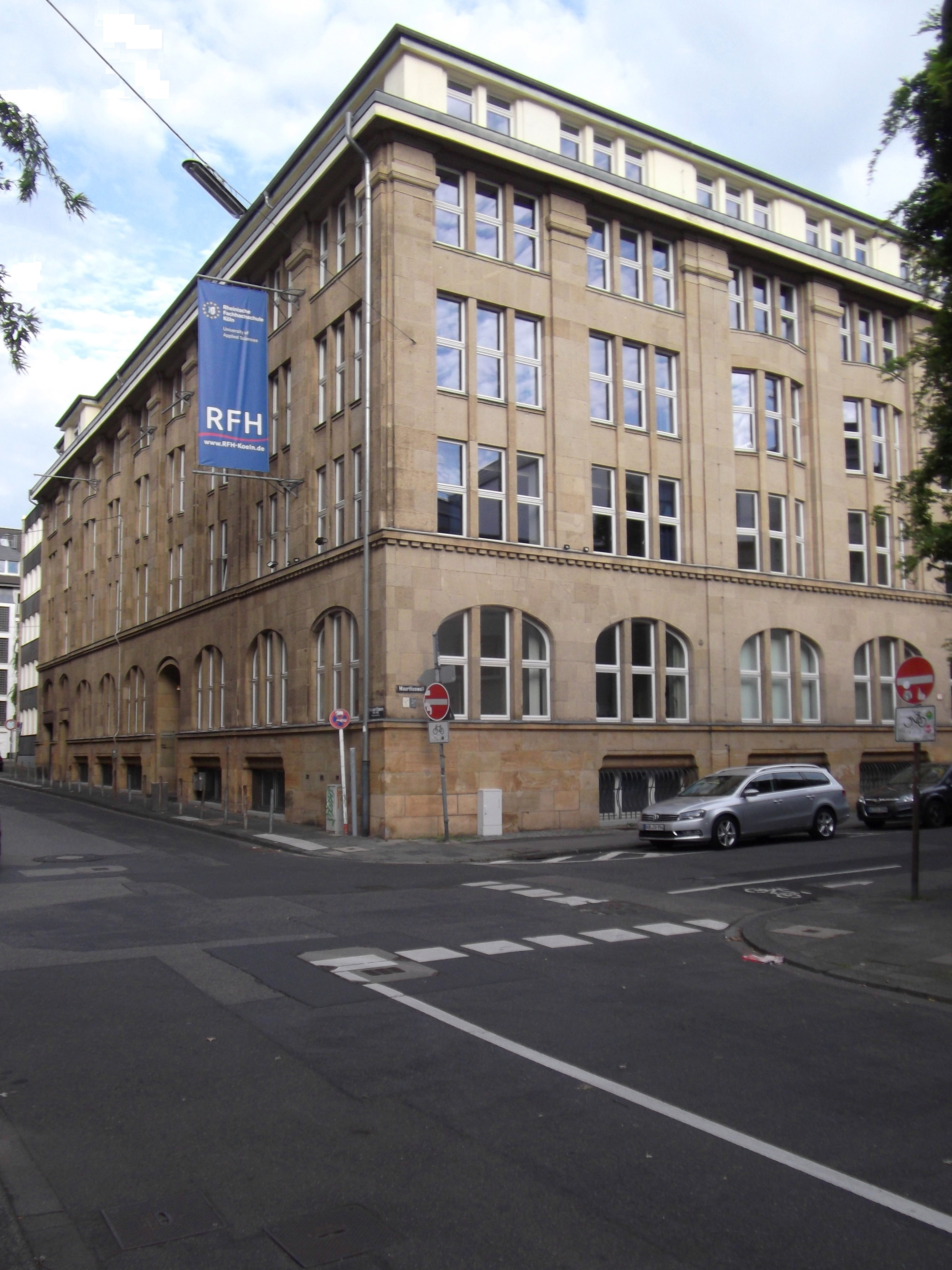 Rheinische Fachhochschule Köln